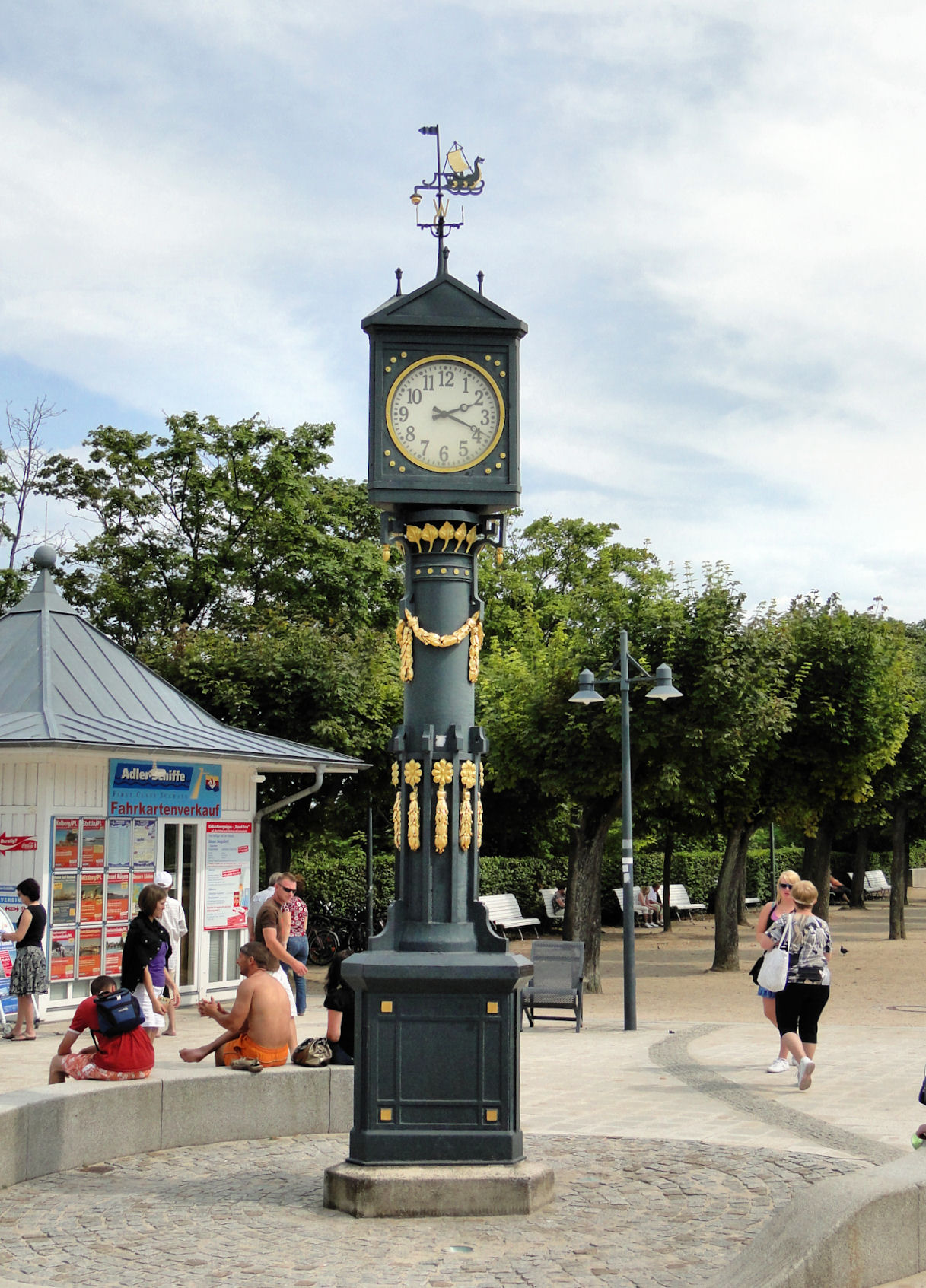 Öffentliche Uhr auf der Promenade in Ahlbeck (Usedom)